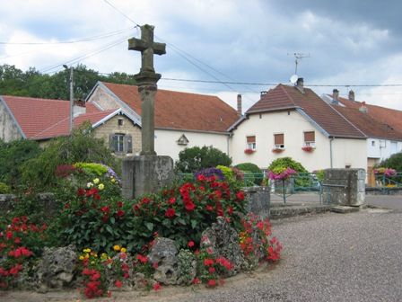 crix fleurie